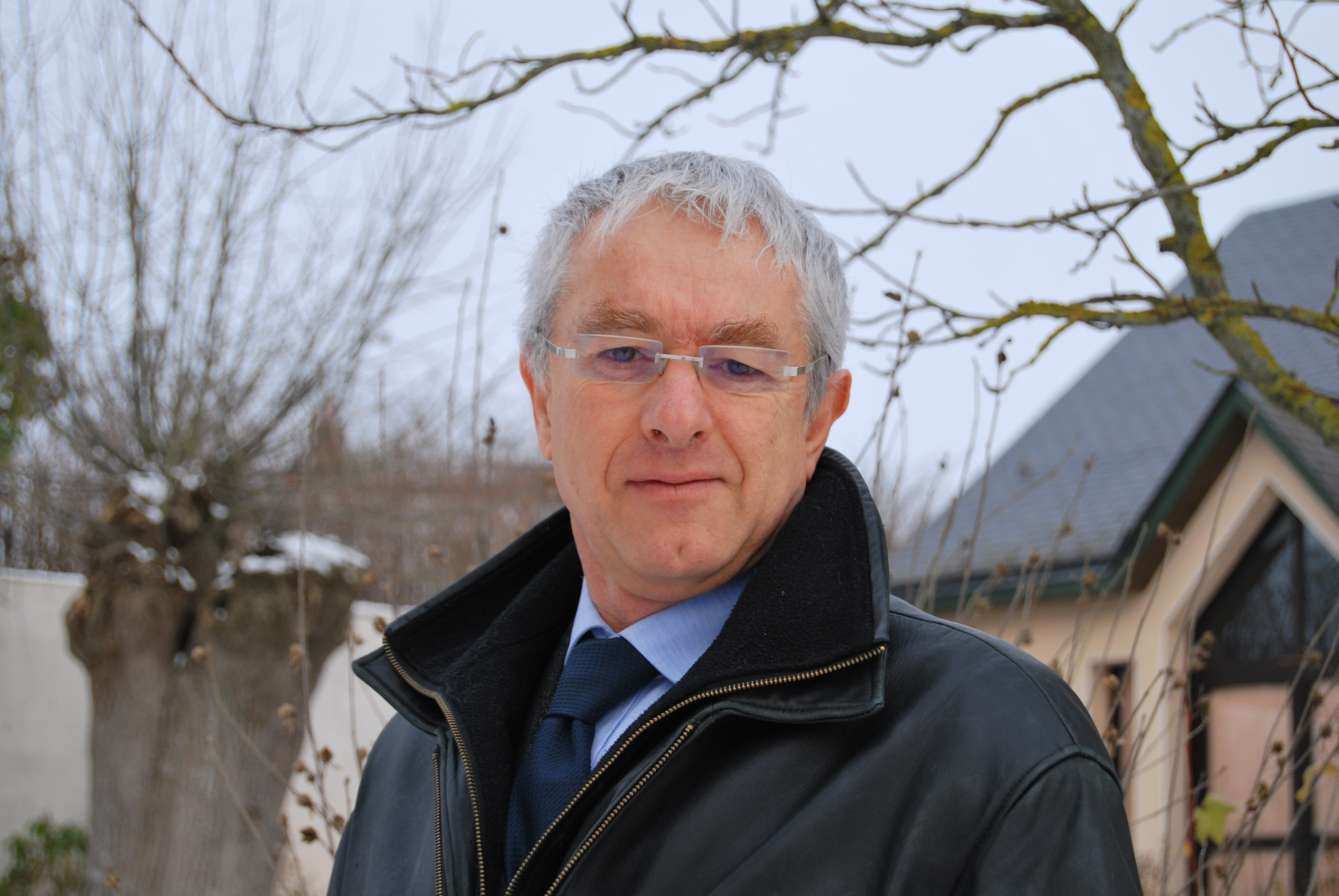 Franck Breteau, maire de Saint-Georges-du-Bois dans le département français de la Sarthe, en janvier 2010.